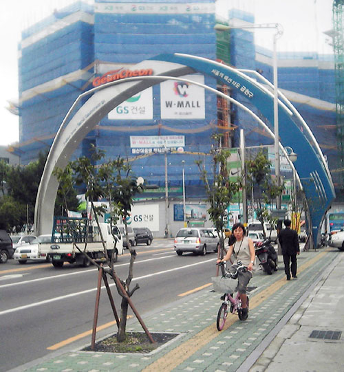 잉벌노문, 금천구, 서울